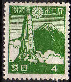 japanese stamp（日本の普通切手）描かれているのは富士山と八紘基塔である。